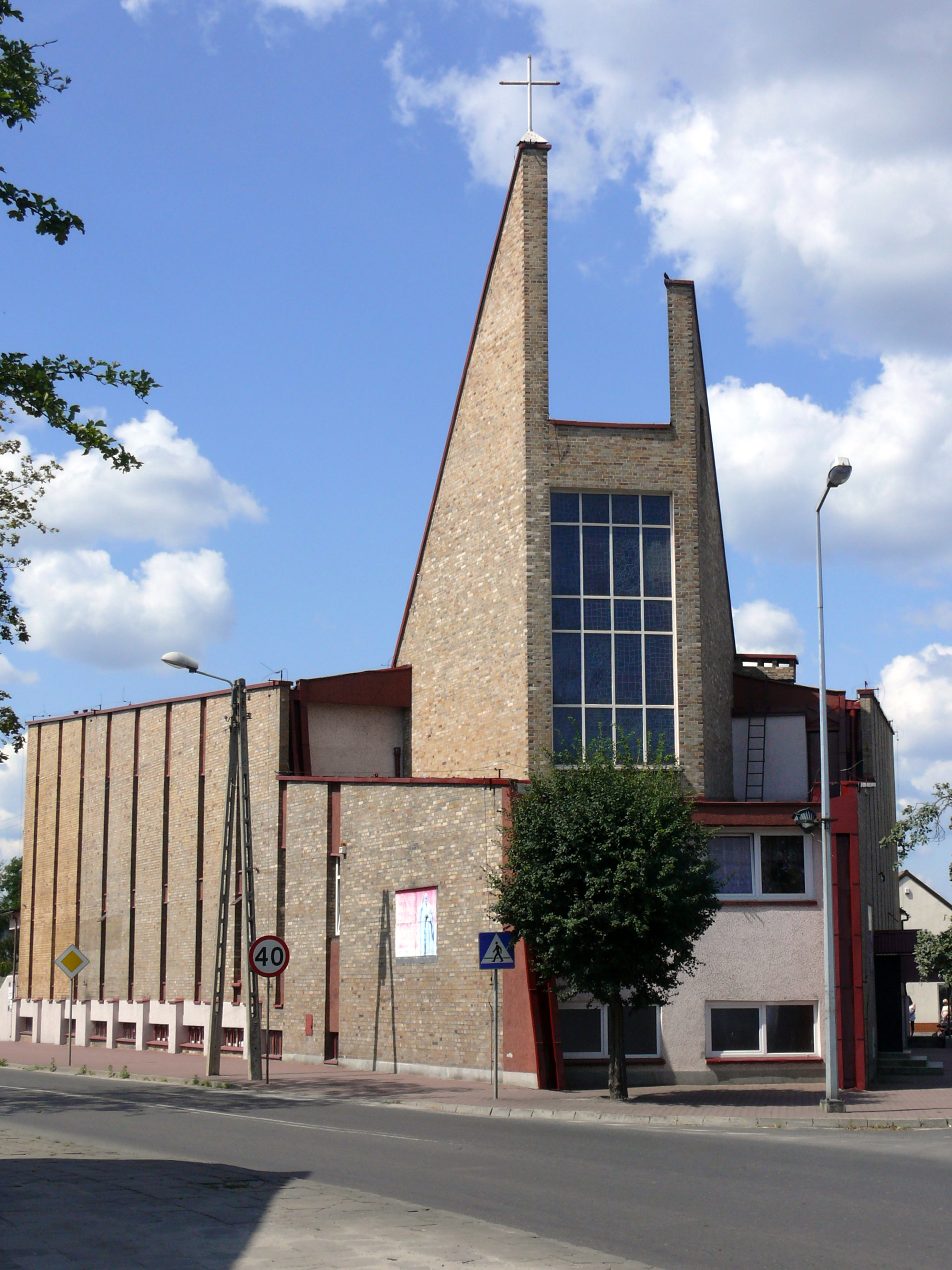 Kościół MB Częstochowskiej w Kole